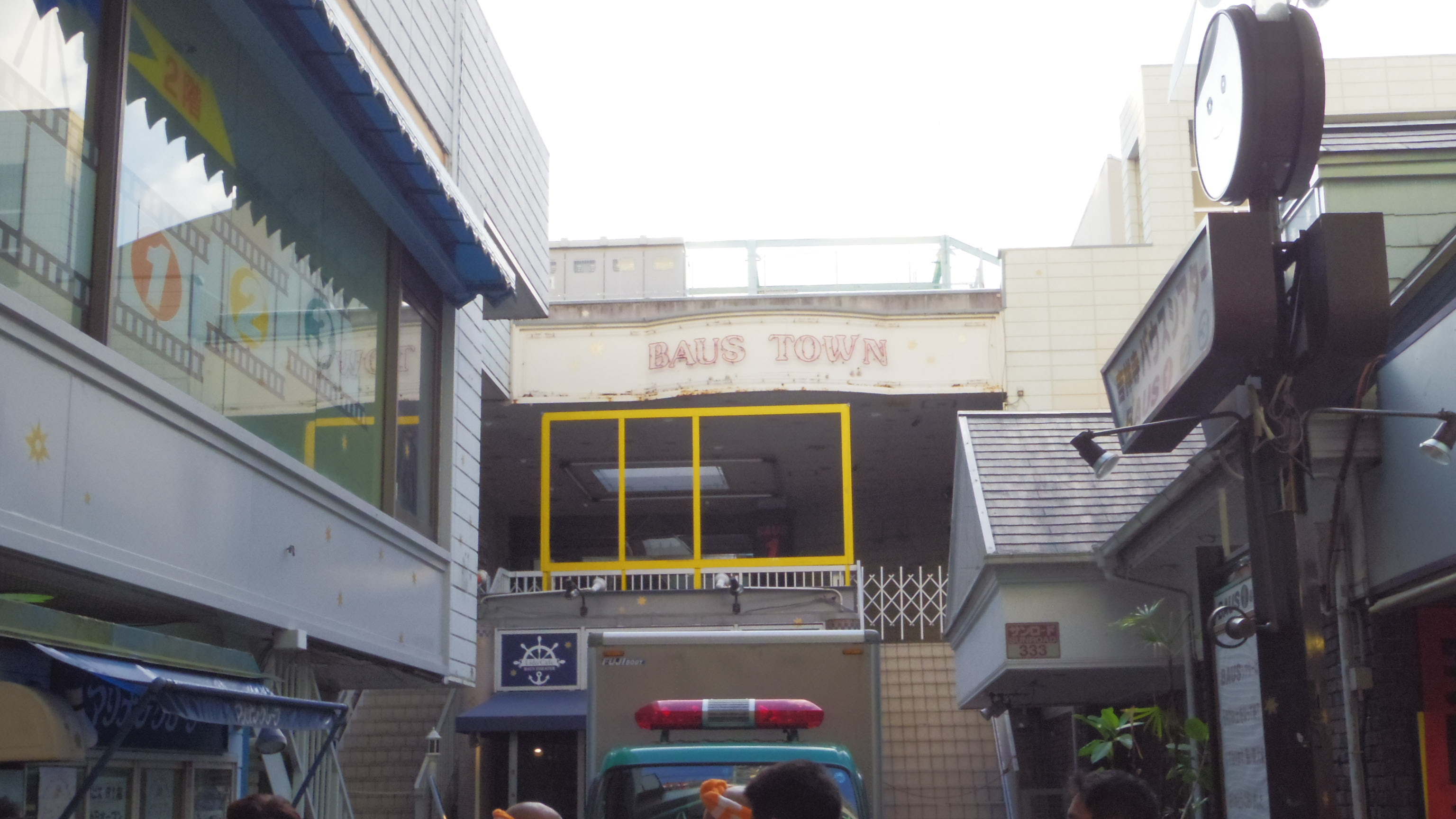 30年に亘り多くのミニシアター系作品を上映してきた映画館「吉祥寺バウスシアター」（2014年5月31日閉館）があった「バウスタウン」跡（東京都武蔵野市吉祥寺本町）。2014年9月14日撮影。